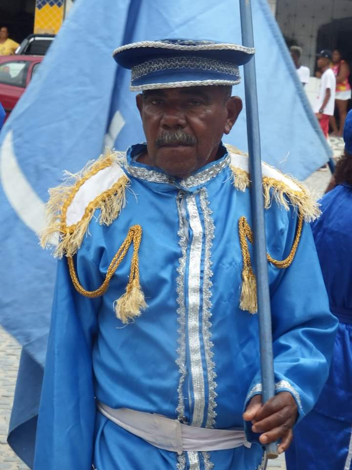 bdhisjbd